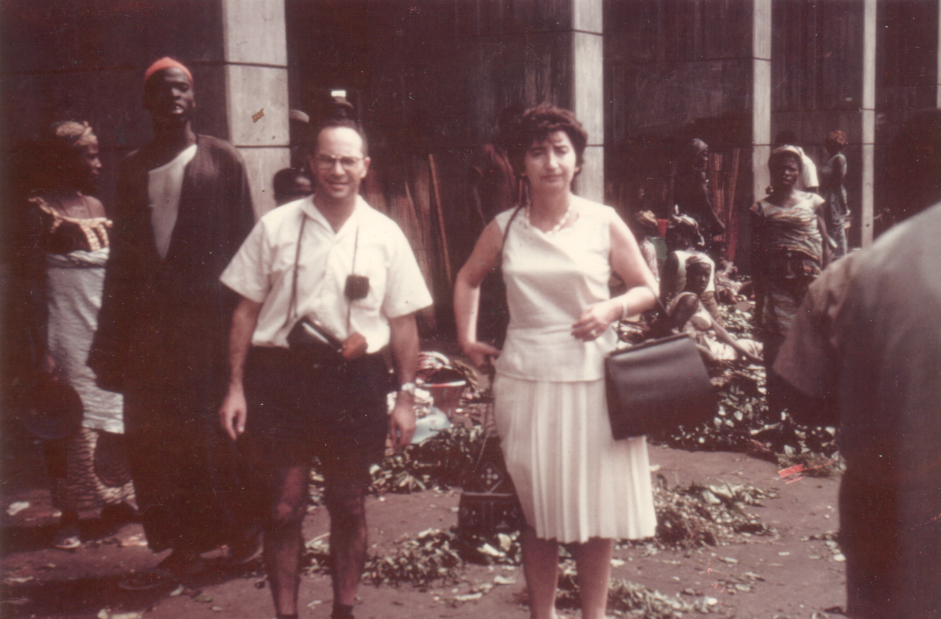 מלכה ברוורמן באחת ממדינות אפריקה (ייתכן אתיופיה, ייתכן קניה), סוף שנות ה-50' תחילת שונות ה-60', באחד מהנסיעותיה המקצועיות.